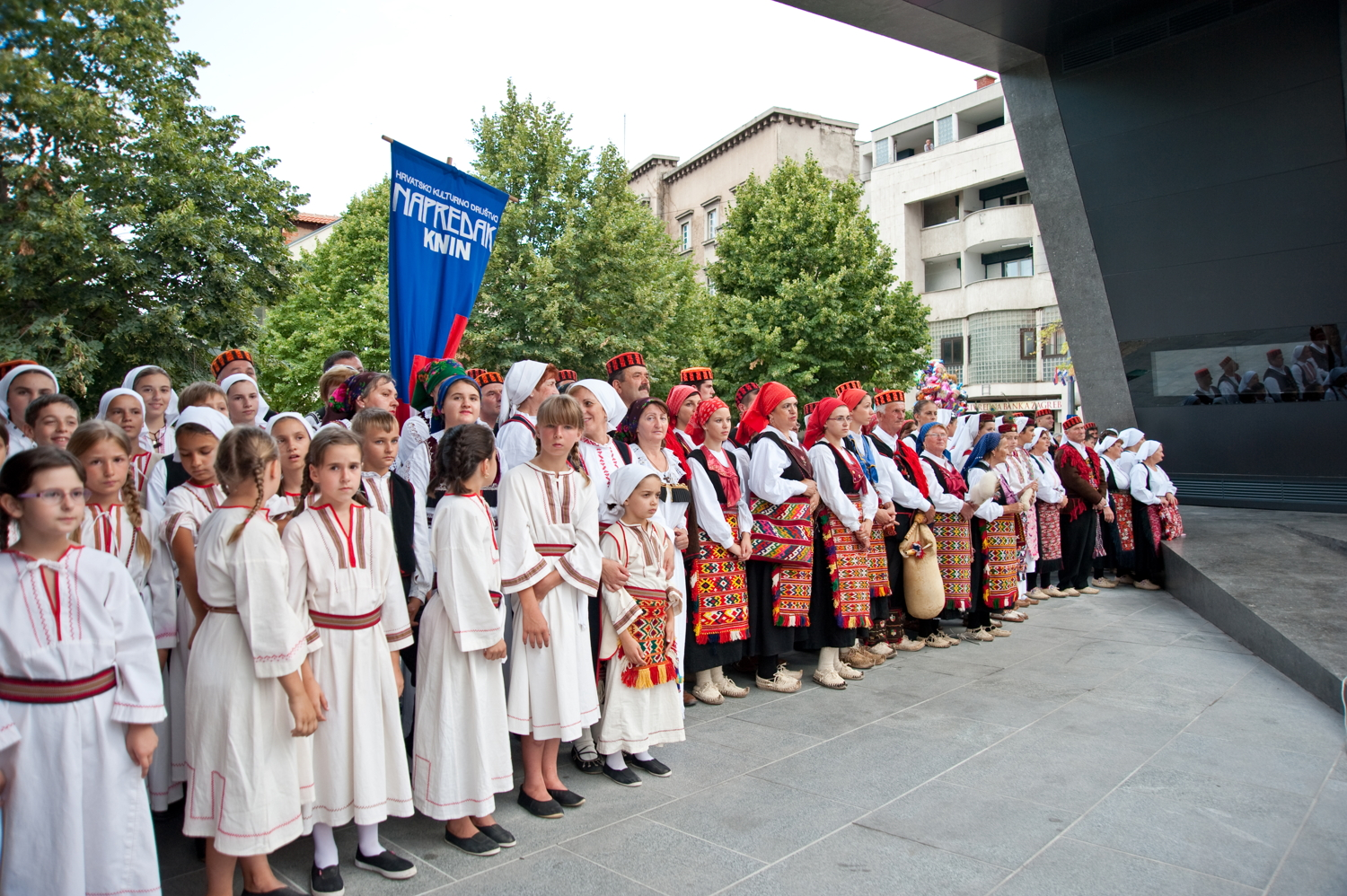 16. obljetnica vojnoredarstvene operacije Oluja u Kninu